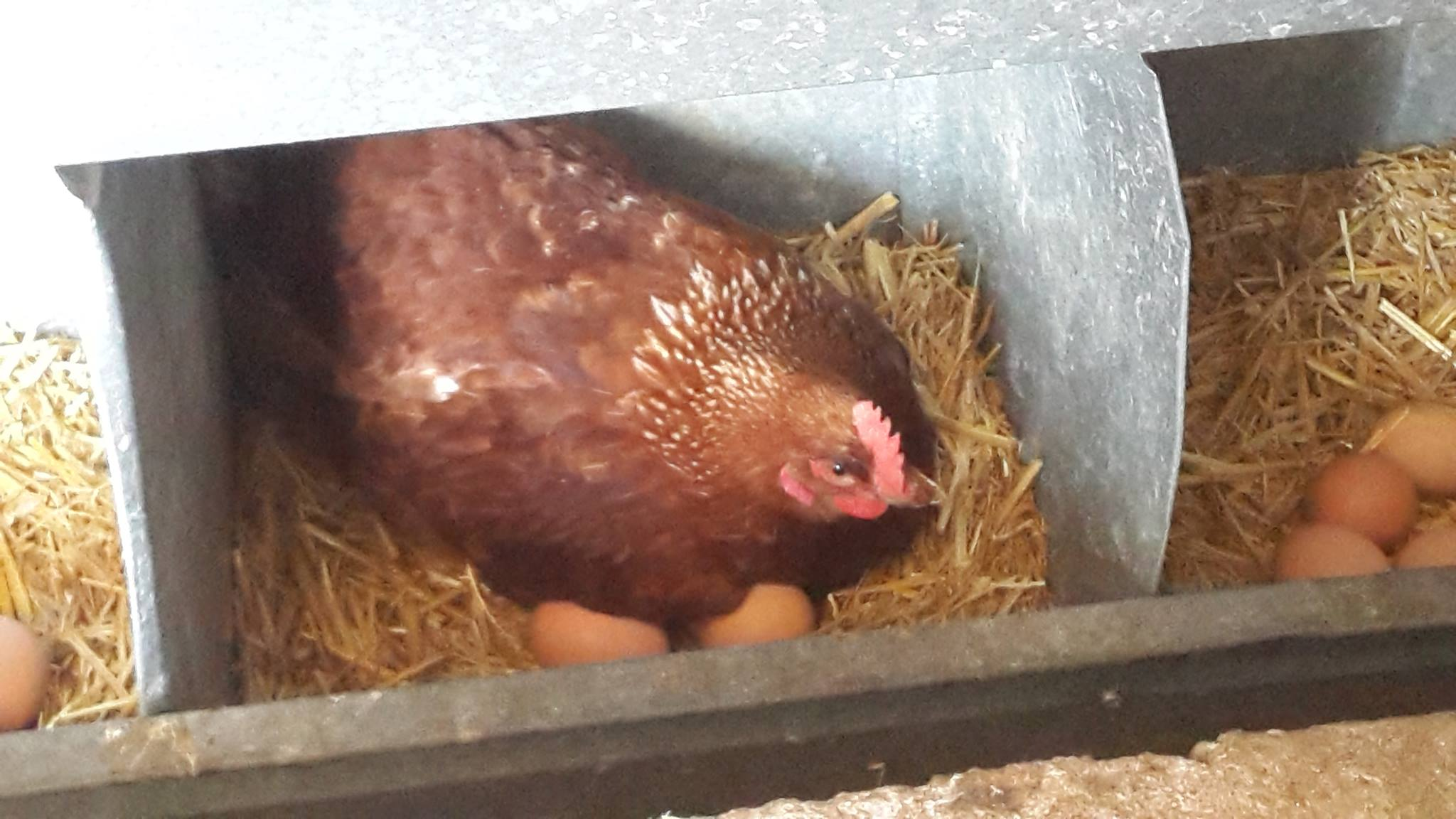 doğal kuluçkaya yatmış kahverengi köy tavuğu